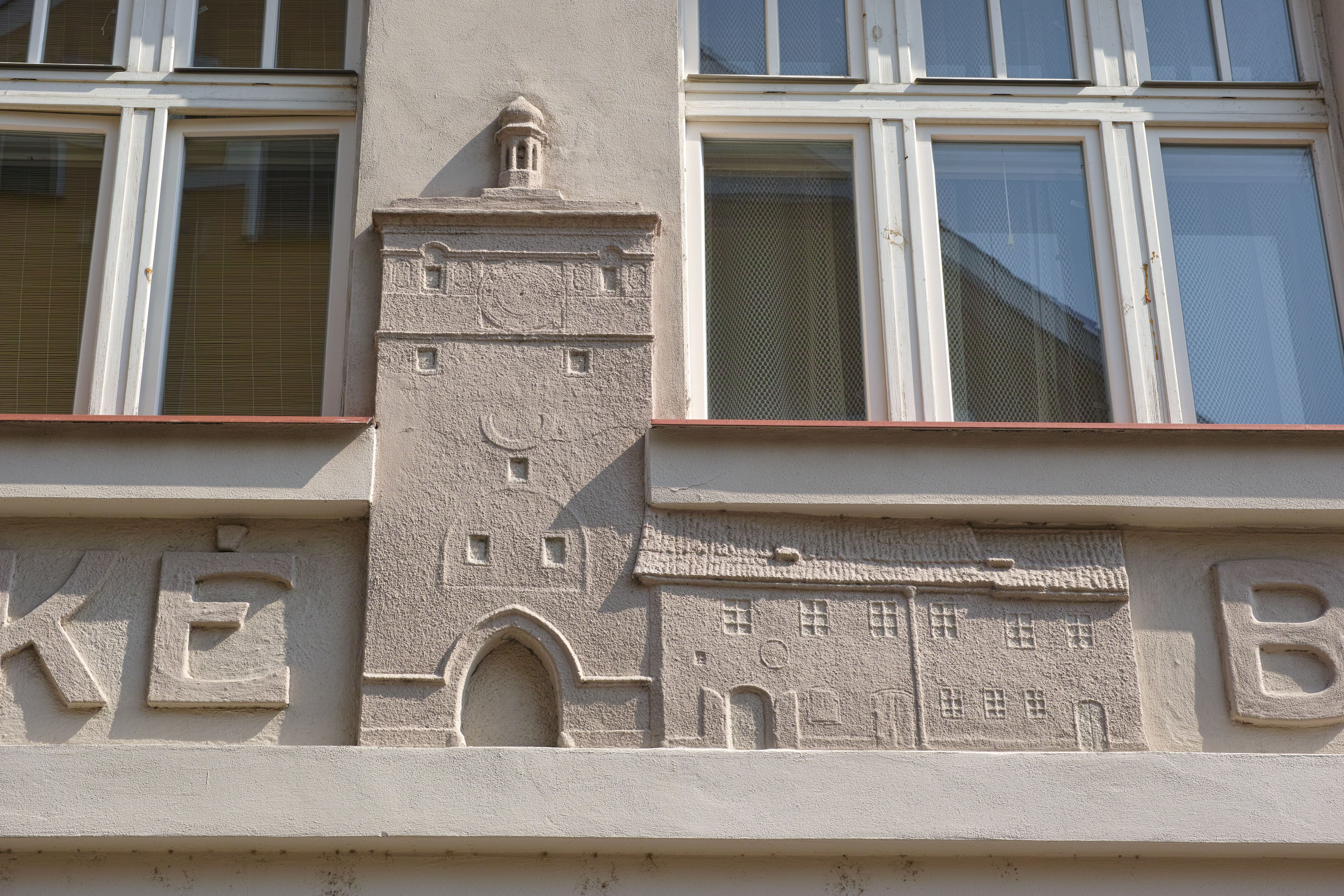 plastika Pražské brány na domu U Pražské brány (Na Mlýnské stoce 282/11), České Budějovice